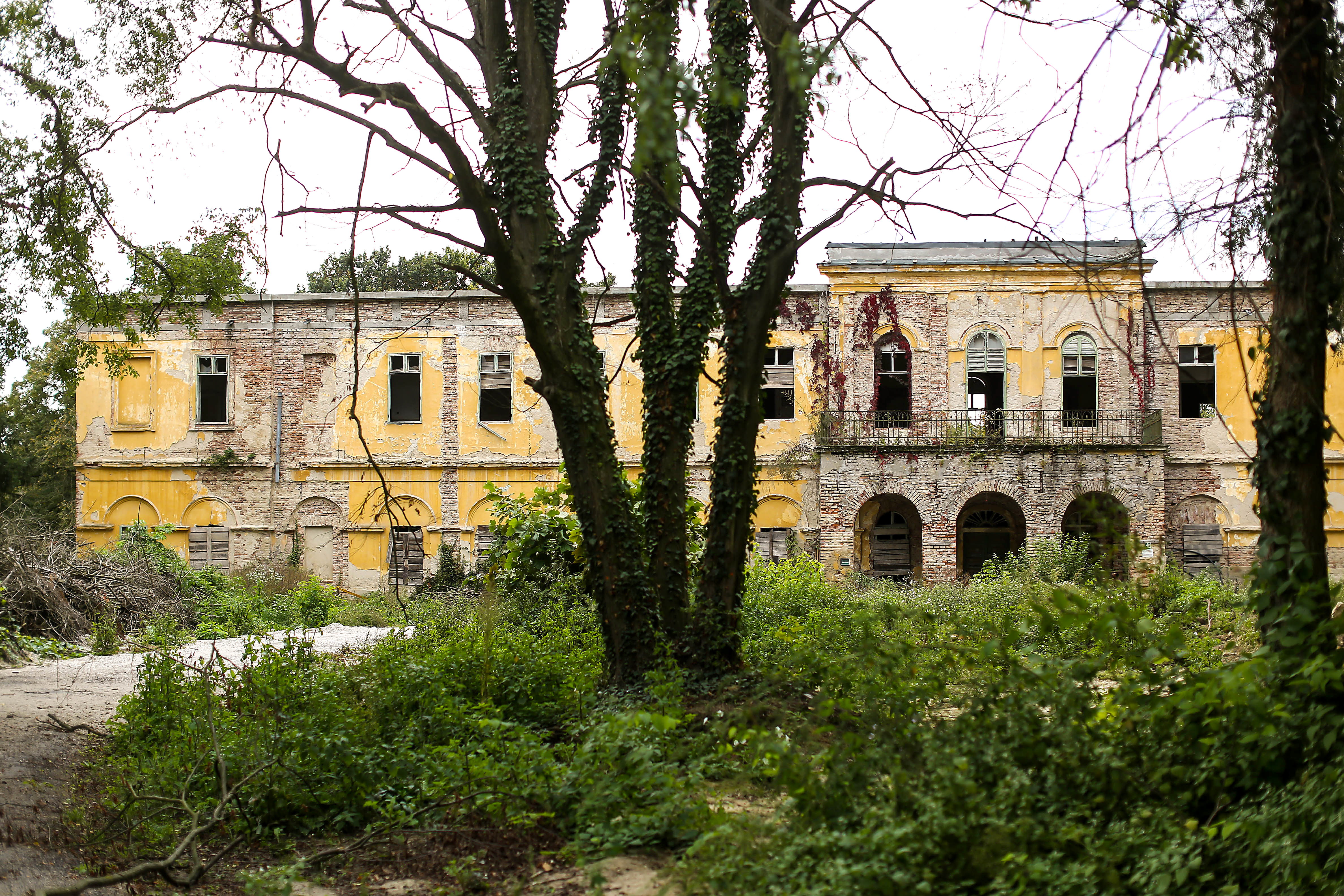 Alsóbogáti Festetics-Inkey Kastély homlokzata